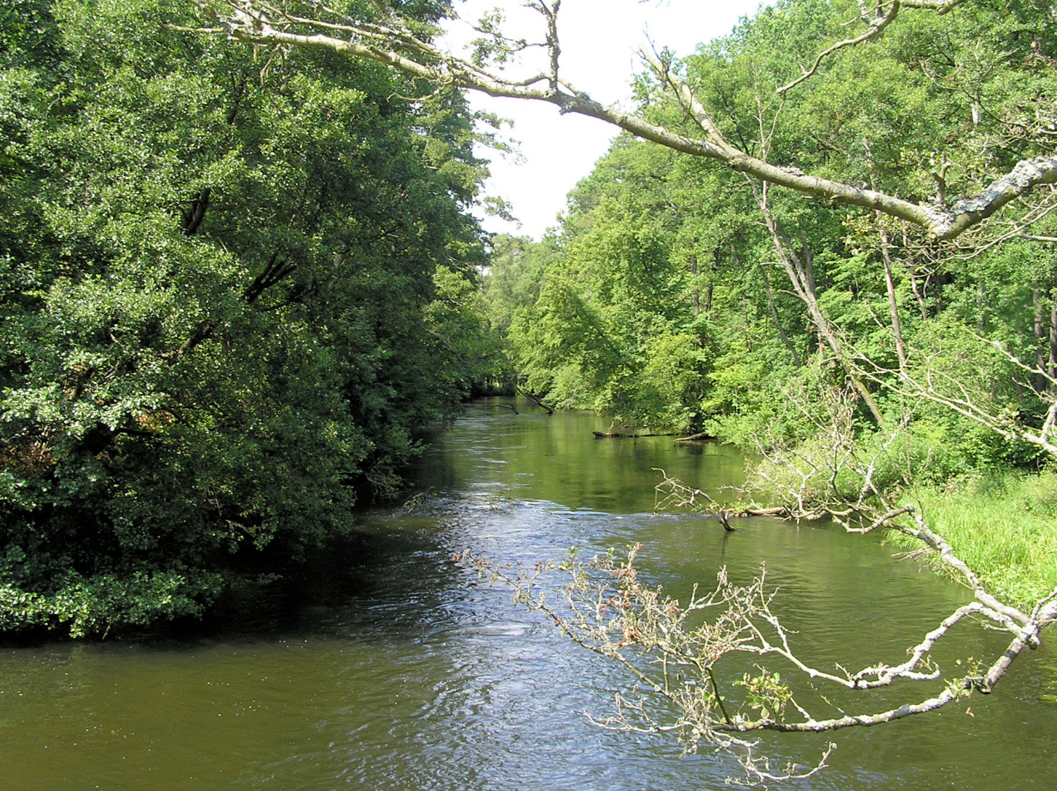 Widok na rzekę Brdę z mostu w Świcie